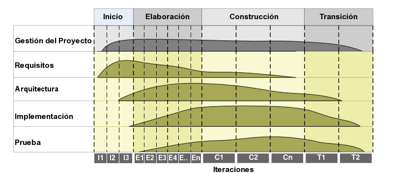 Imagen del ciclo de vida de un proyecto de desarrollo que se guíe por openUP